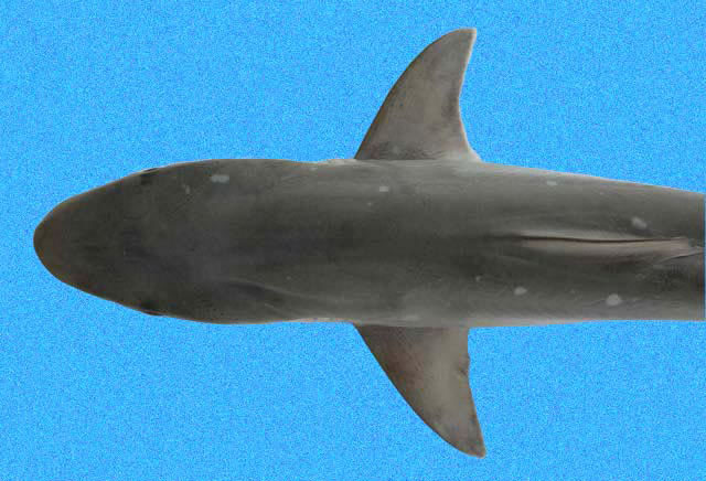 Rhizoprionodon terraenovae, Florida